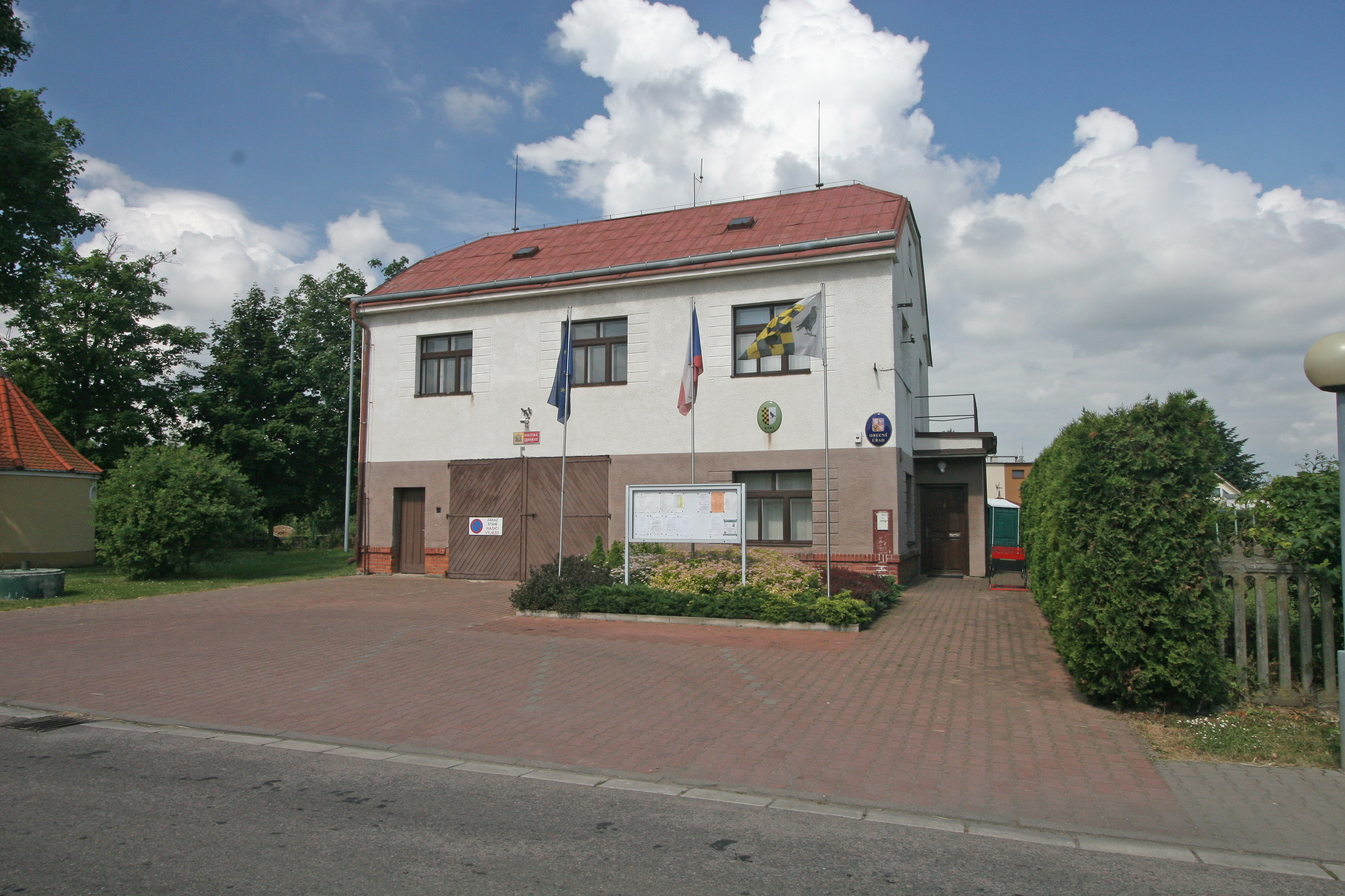 Ráby obecní úřad